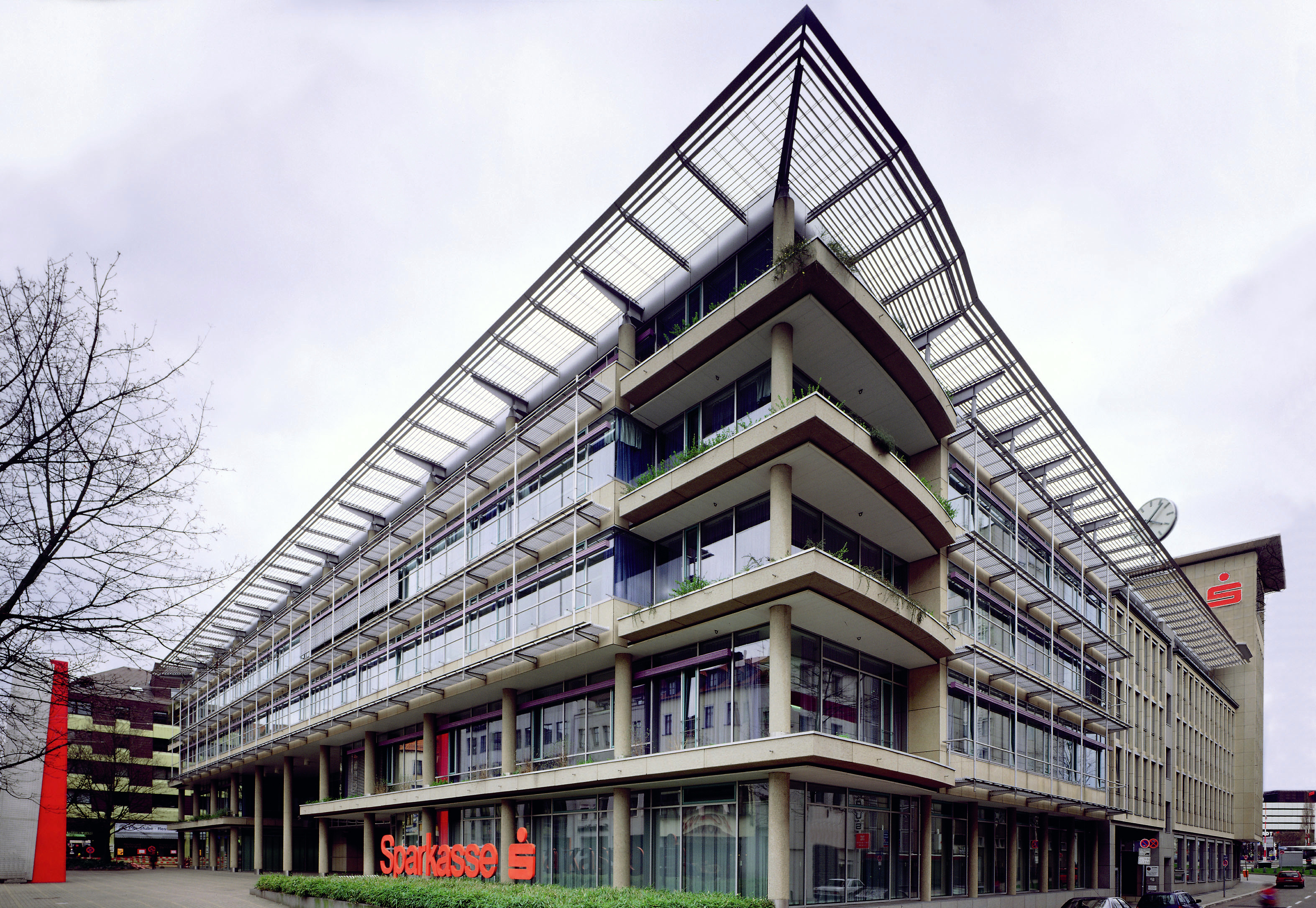 Sparkasse Saarbruecken